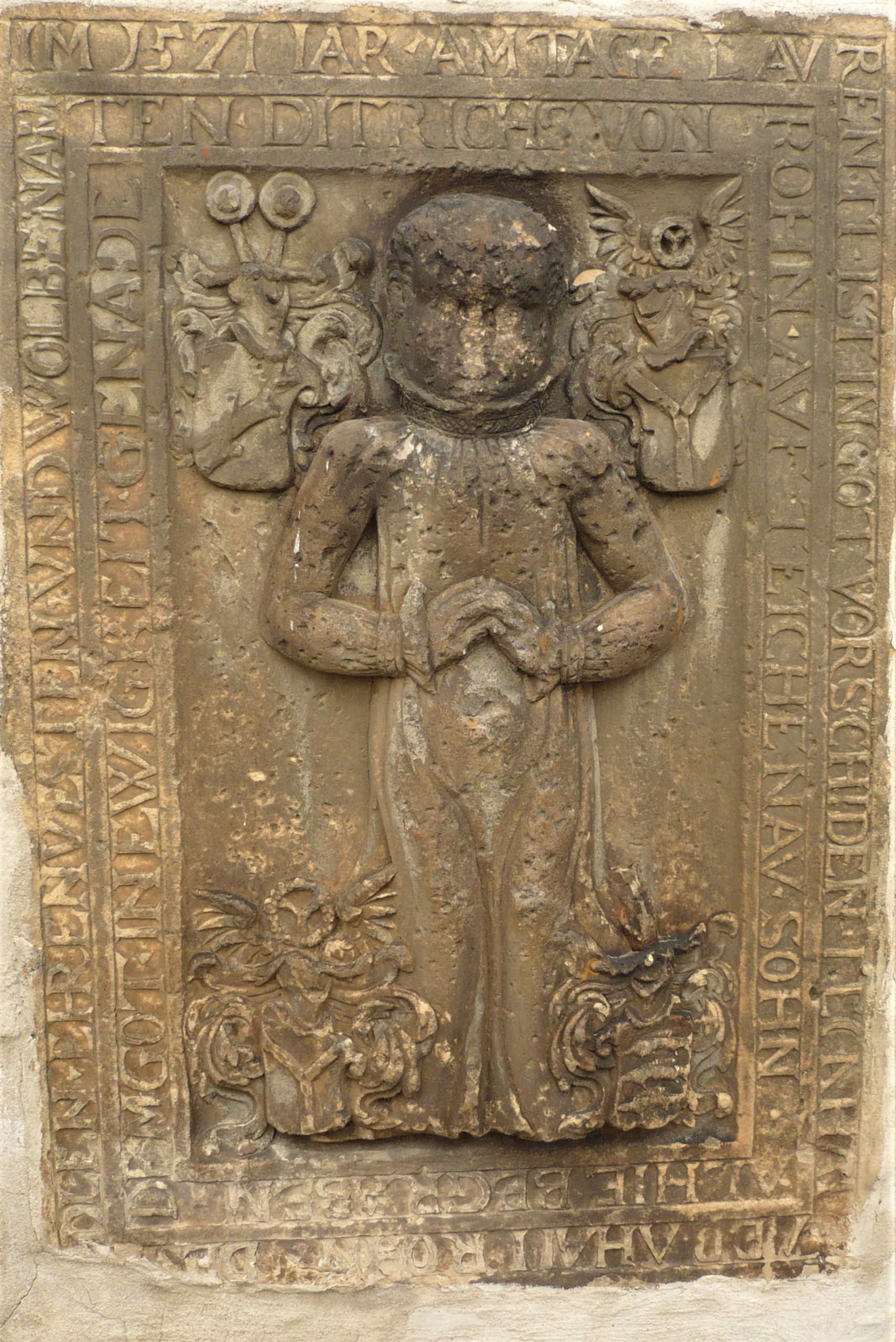 Kościół w Wierzbnej